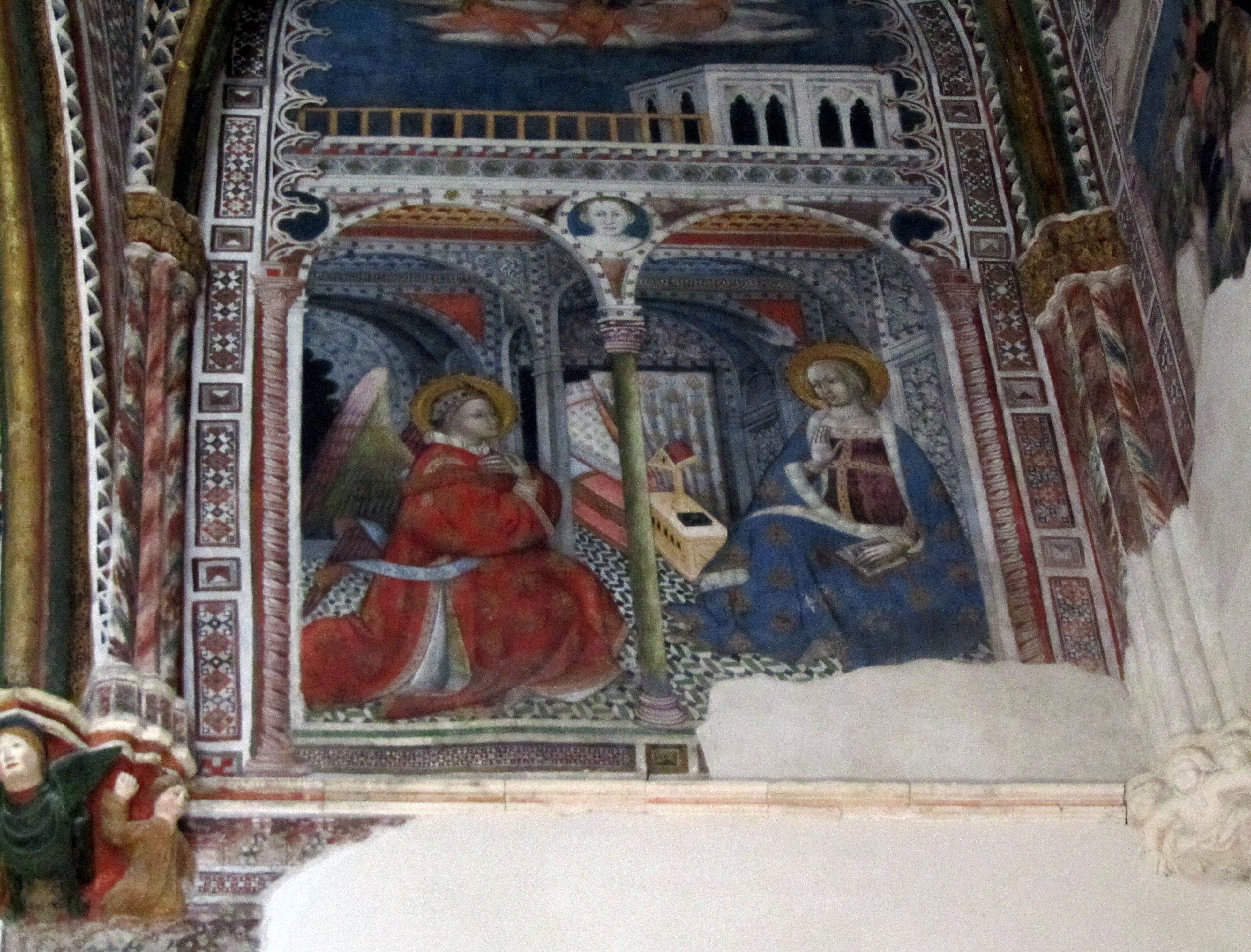 Fresco de la Anunciación en la capilla de San Blas de la catedral de Toledo (España).